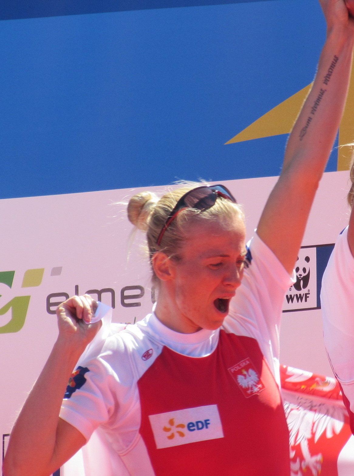 Weronika Deresz, Ruder-EM 2016